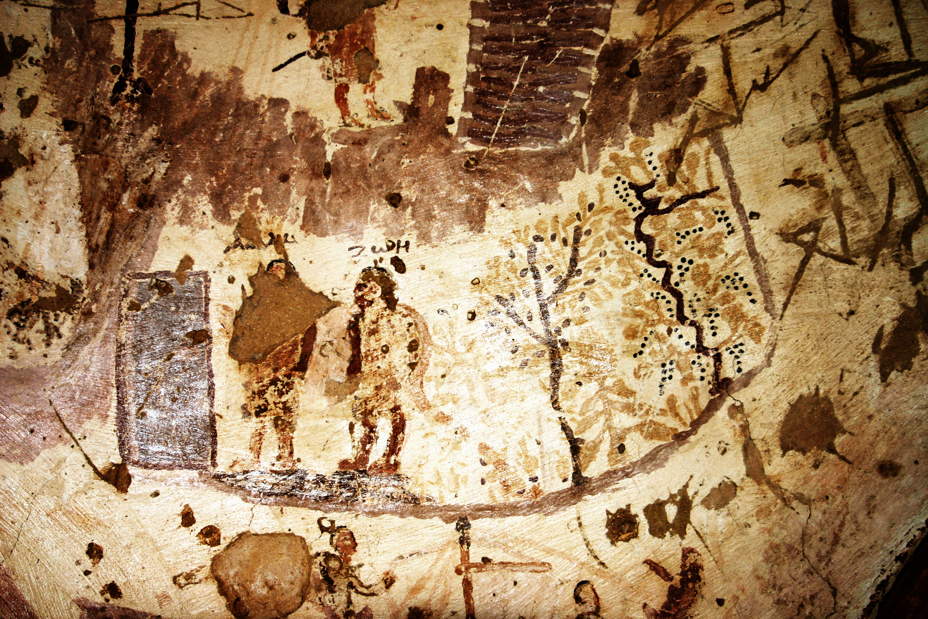 Nécropole chrétienne de l'oasis d'Al-Bagawat